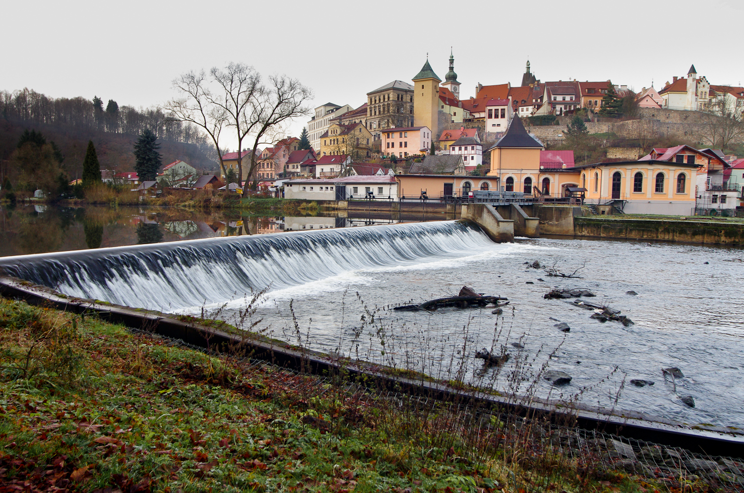 Ohře v Lokti, horní jez